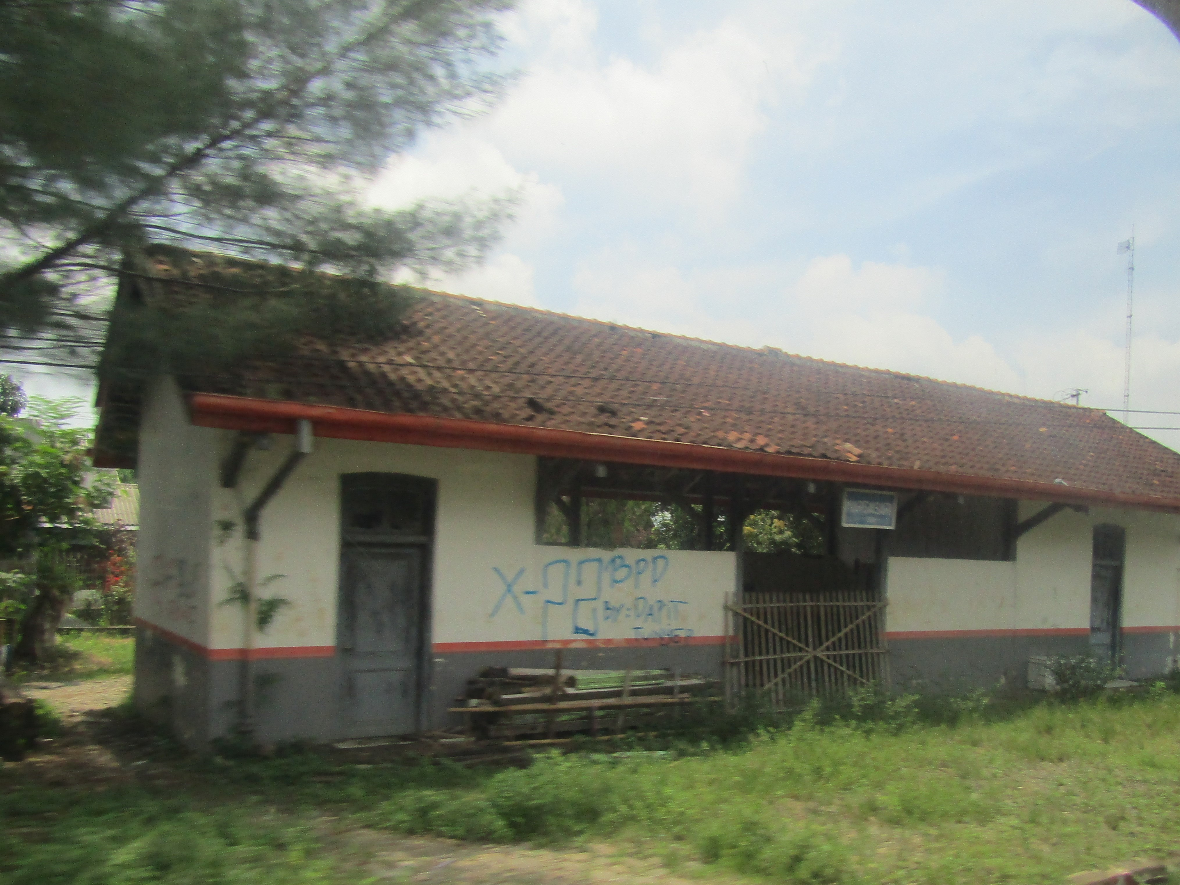 Tampak peron Stasiun Margasari, 2019